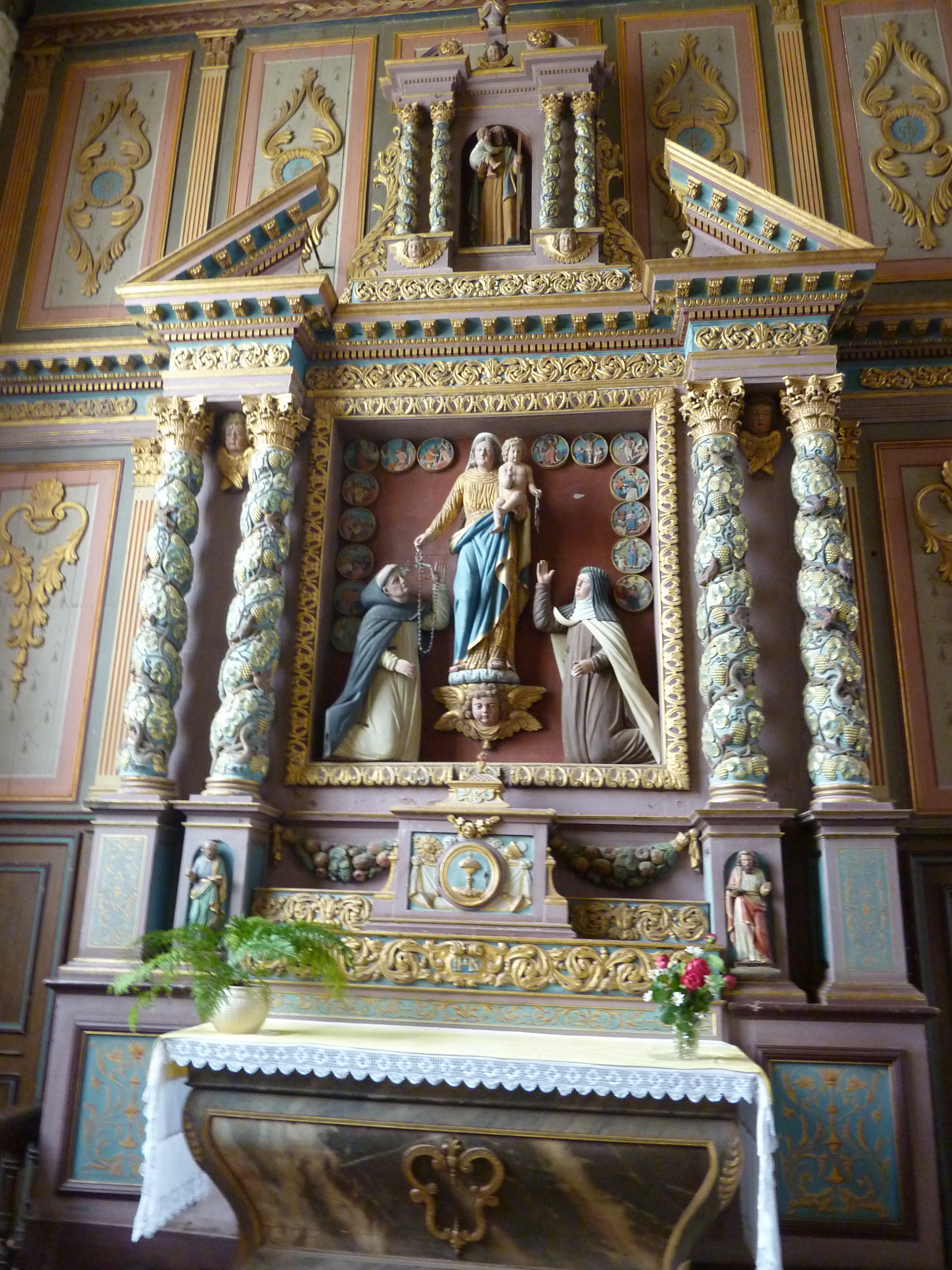 Brasparts: église Notre-dame-et-saint-Tugen, autel du Rosaire